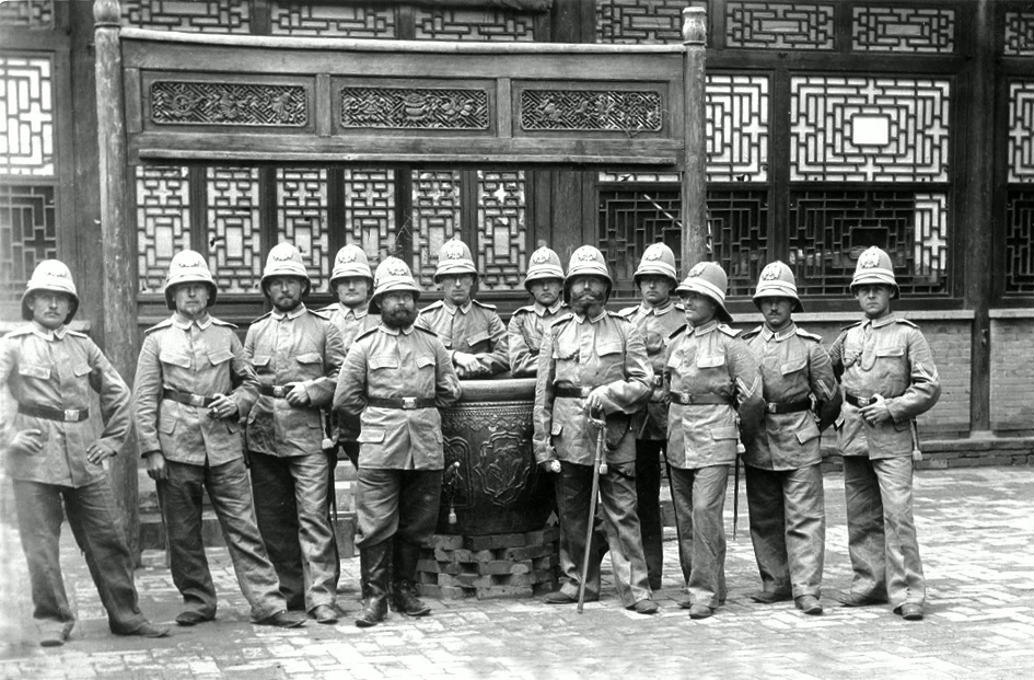 Generalfeldmarschall Graf von Waldersee (4 v.r.) im September 1900 in Tientsin (Tianjin)